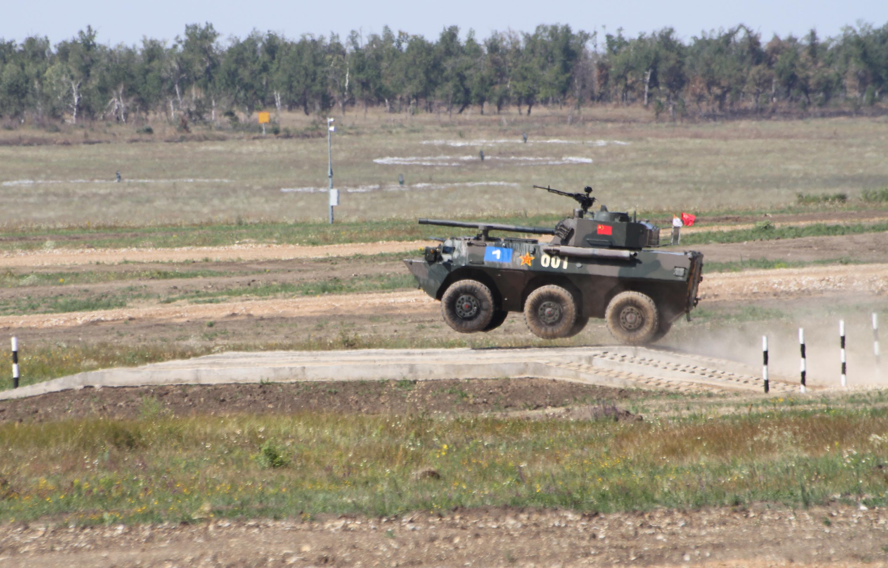 Расчёт из Китая на марше. Состязания конкурса "Мастера артиллерийского огня".